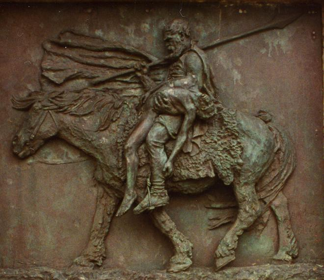 Egill Skallagrímsson 1995-IS-02-00 Egil Skallagrimson Þann dag spurði Egill þessi tíðindi, og þegar reið hann að leita líkanna; hann fann rétt lík Böðvars. Tók hann það upp og setti í kné sér og reið með út í Digranes til haugs Skalla-Gríms. Hann lét þá opna hauginn og lagði Böðvar þar niður hjá Skalla-Grími; var síðan aftur lokinn haugurinn, og var eigi fyrr lokið en um dagseturs skeið. Eftir það reið Egill heim til Borgar, og er hann kom heim, þá gekk hann þegar til lokrekkju þeirrar, er hann var vanur að sofa í; hann lagðist niður og skaut fyrir loku. Engi þorði að krefja hann máls. wikisource:Egils sagaThe picture was made by Gangleri 1995 in Borgarnes, Iceland in "Skallagrímsgarður", the park of Skallagrímur named after Egils father. In the park is the gravehill where both Skallagrímur the father of Egill and Böðvar his son are buried